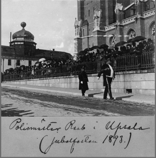 Polismästaren Raab i Upsala 1893